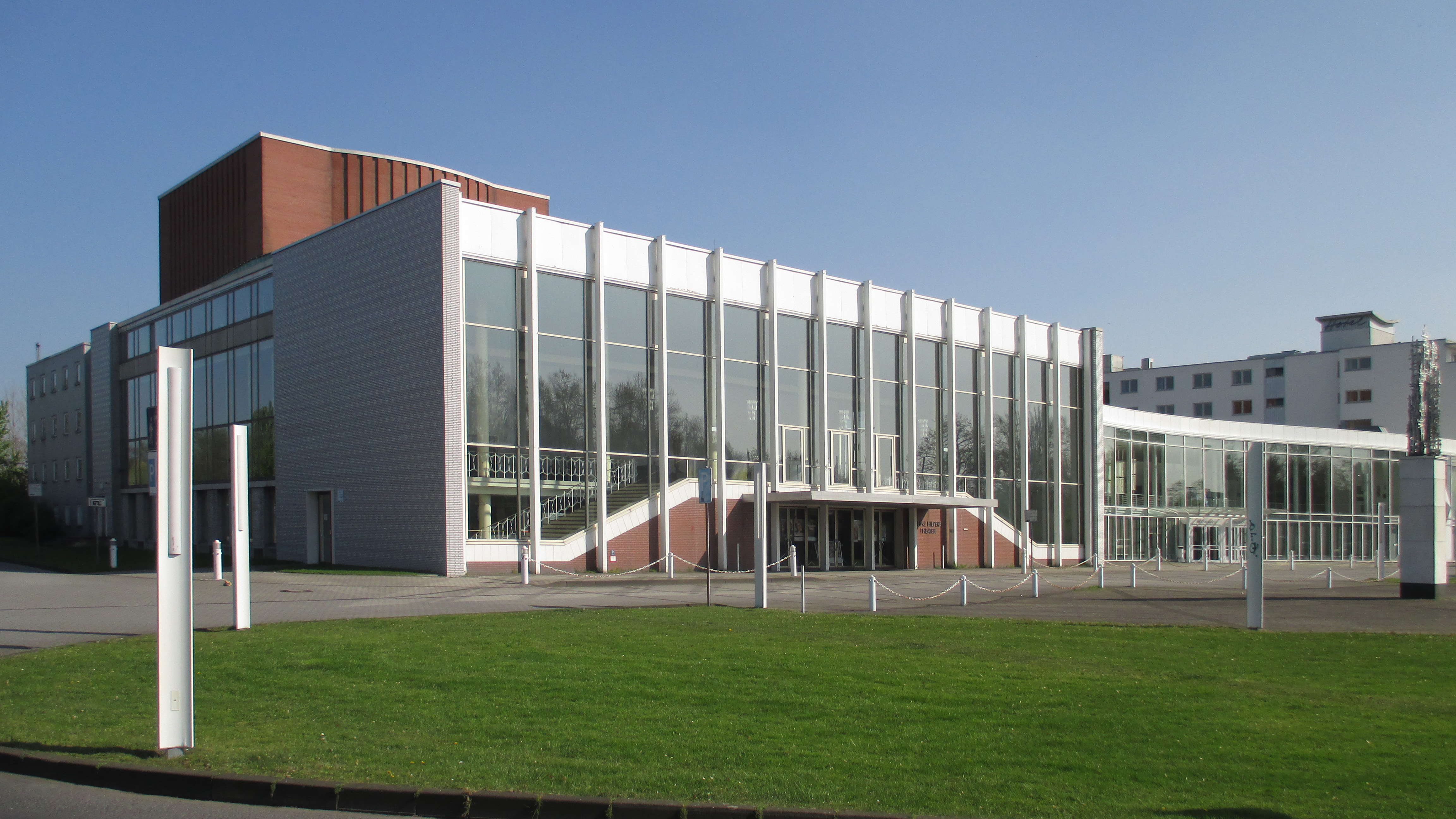 Das Heinz-Hilpert-Theater wurde 1956-58 erbaut und nach einem der größten Theaterregisseur der 1920er und 1930er Jahre benannt.